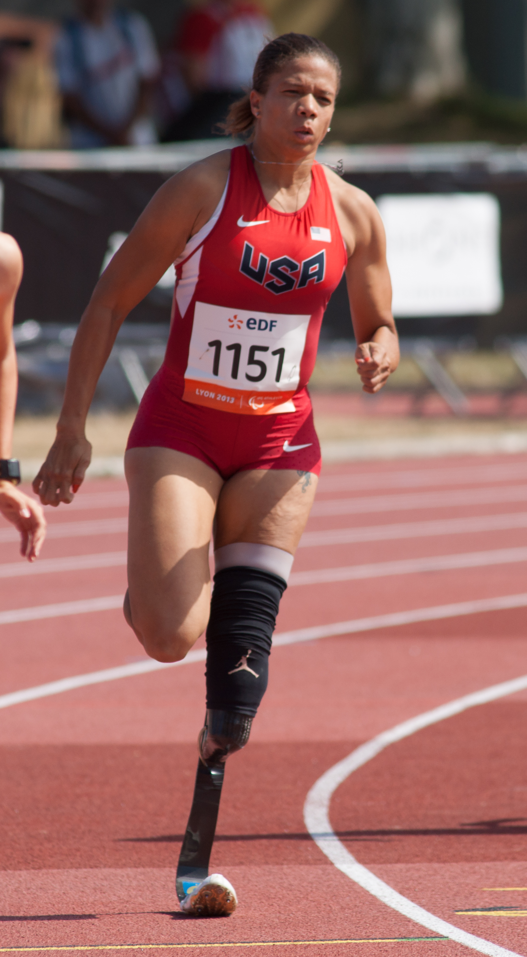 Championnats du monde d'athlétisme IPC 2013.